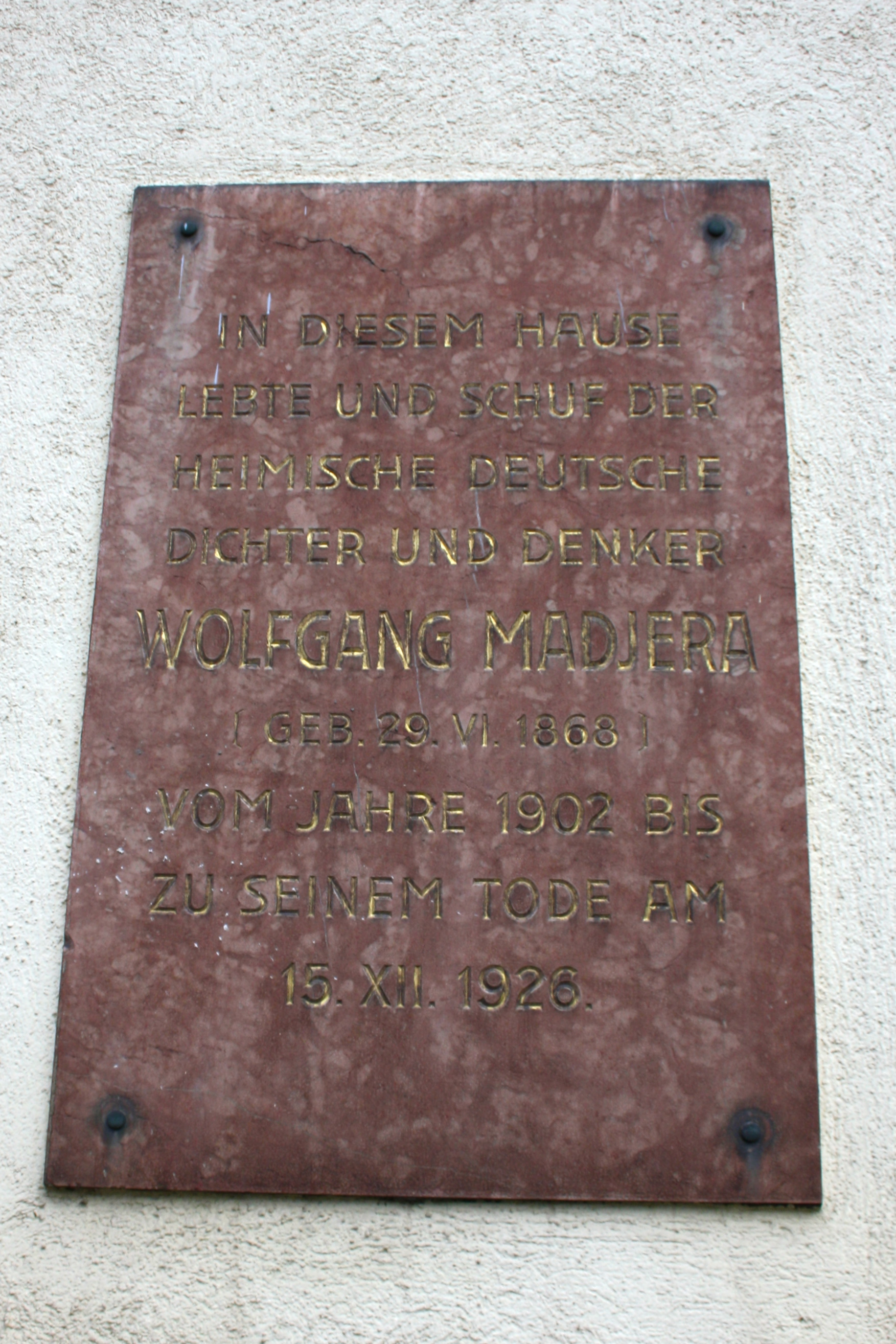 Gedenktafel für Wolfgang Madjera am Liebfrauenhaus, Anastasius-Grün-Gasse 25, 1180 Wien.